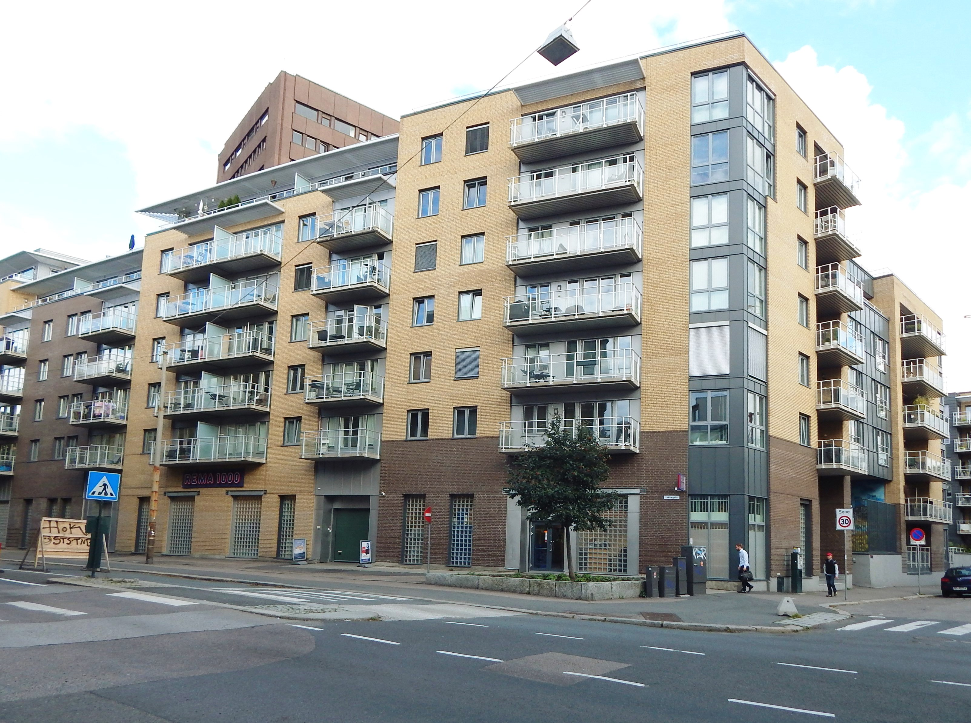 Bebyggelse i boligsameiene med navn Wexels' plass